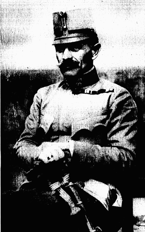 Hermann Kusmanek von Burgneustädten (1860-1934) as Austrian Feldmarschalleutnant (Lieutenant Field Marshal) as denoted by worn insignia